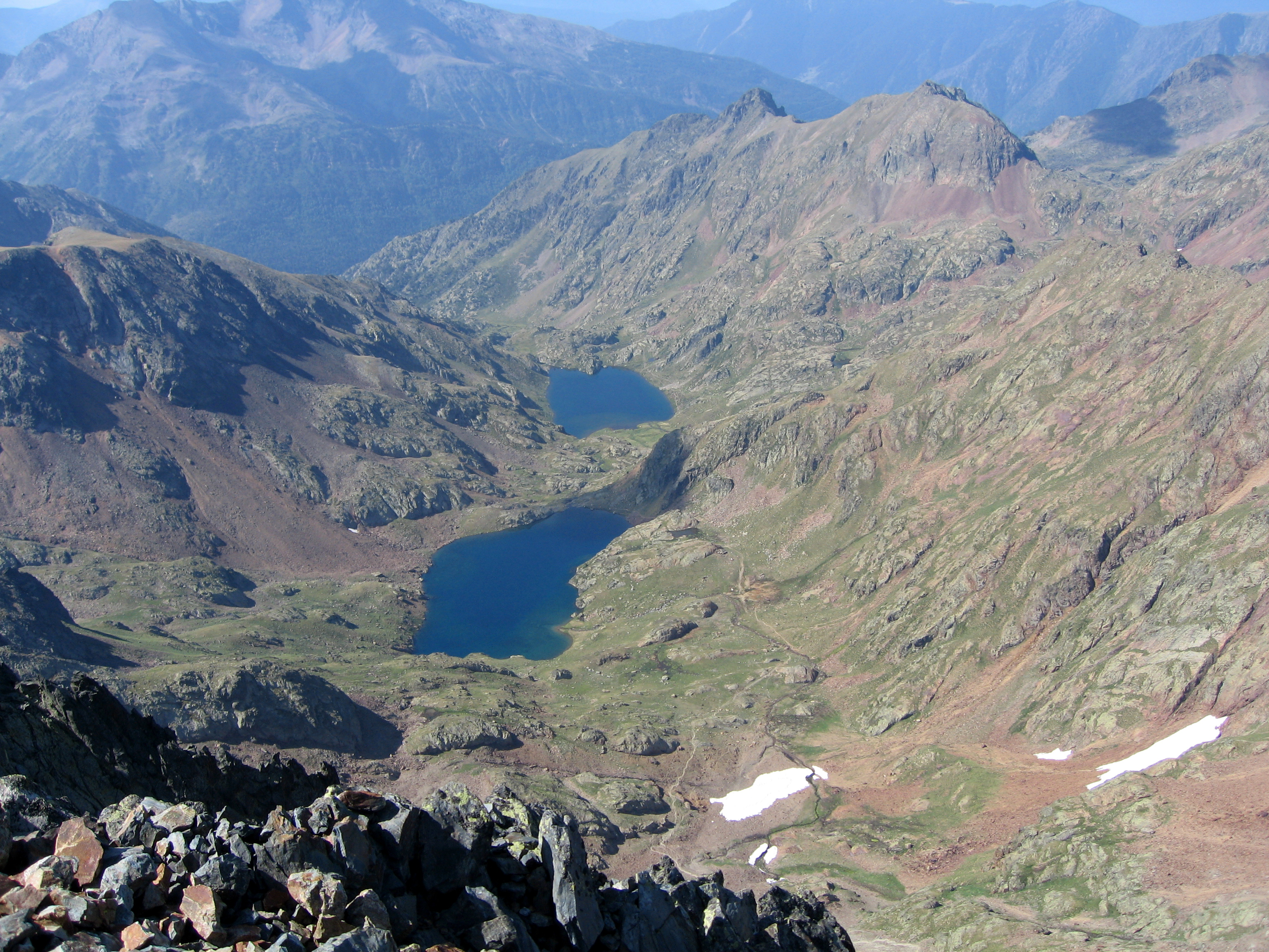 Pica d'Estats (3143m)